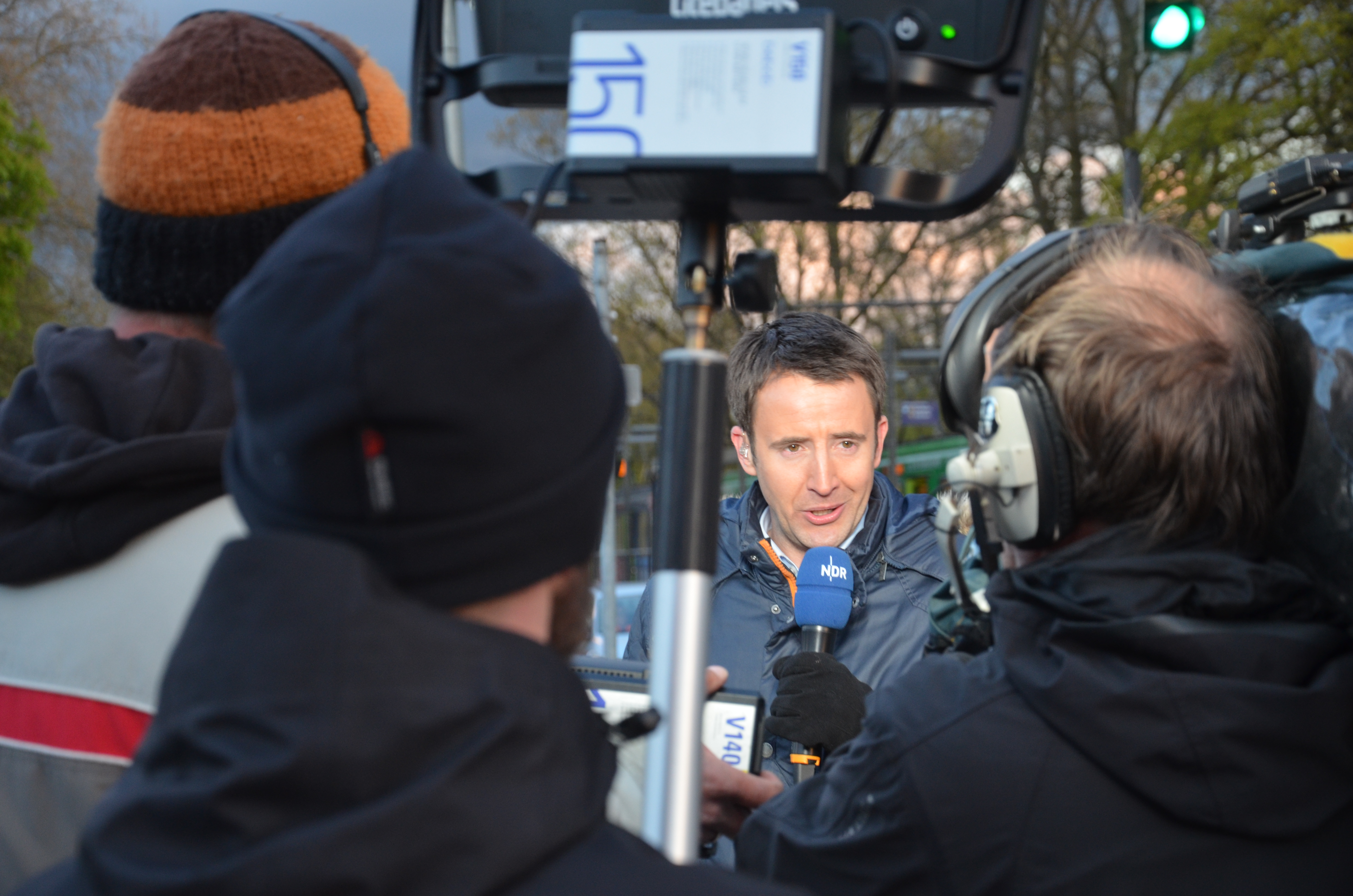 Das Team vom NDR Fernsehen um den Moderator Jan Starkebaum vor der Polizei-Absperrung an den Herrenhäuser Gärten, hier live während der Übertragung anlässlich der Rückkehr des Präsidenten der Vereinigten Staaten von Amerika Barack Obama gemeinsam mit Bundeskanzlerin Angela Merkel vom Hannover Congress Centrum (HCC) zum Abendessen mit ausgesuchten Gästen im Herrenhäuser Schloss ...